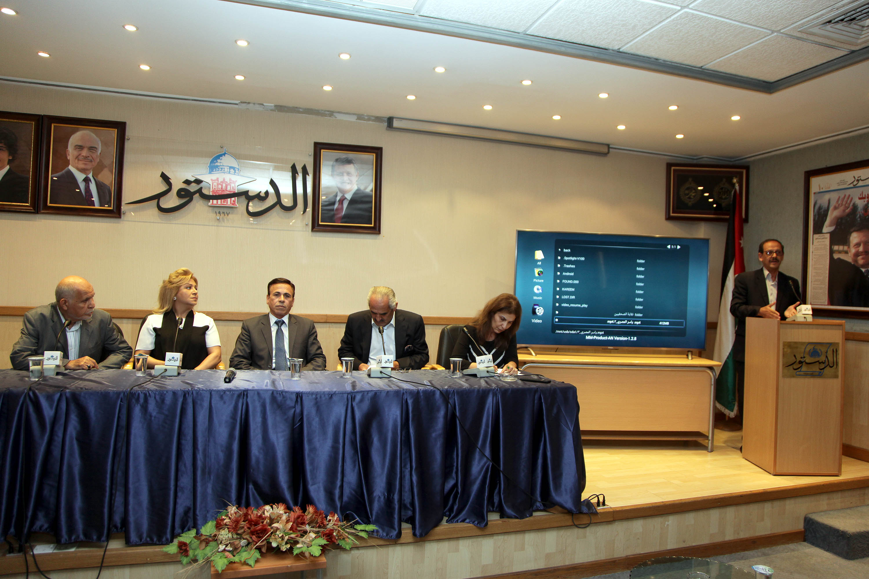 ندوة استذكار الفنان ياسر المصري في منتدى الدستور الثقافي يوم 29 أغسطس تصوير أحمد عبده الشركة الأردنية للصحافة والنشر الدستور ا